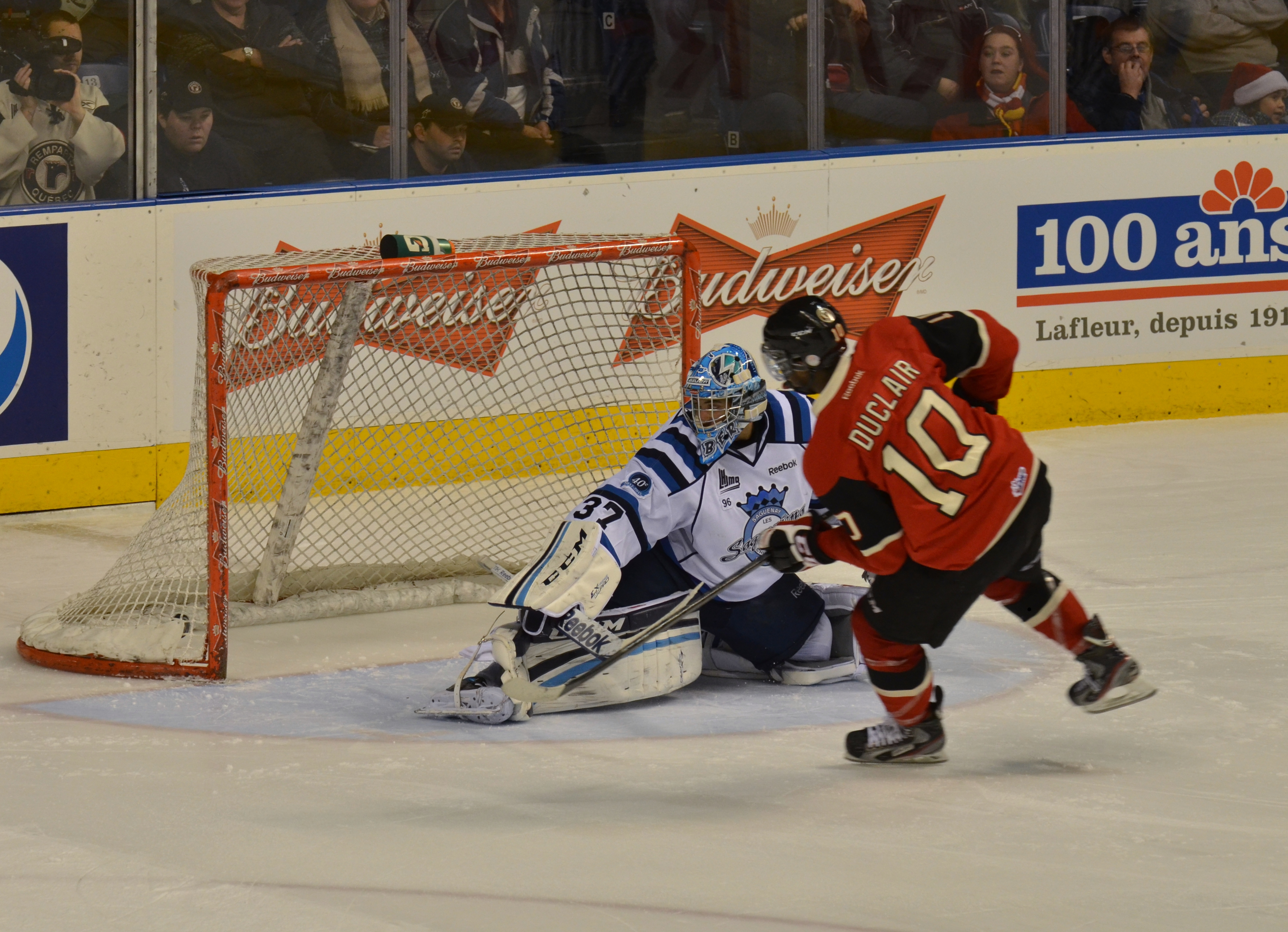 Lors d'un match entre les Remparts de Québec et les Saguenéens de Chicoutimi